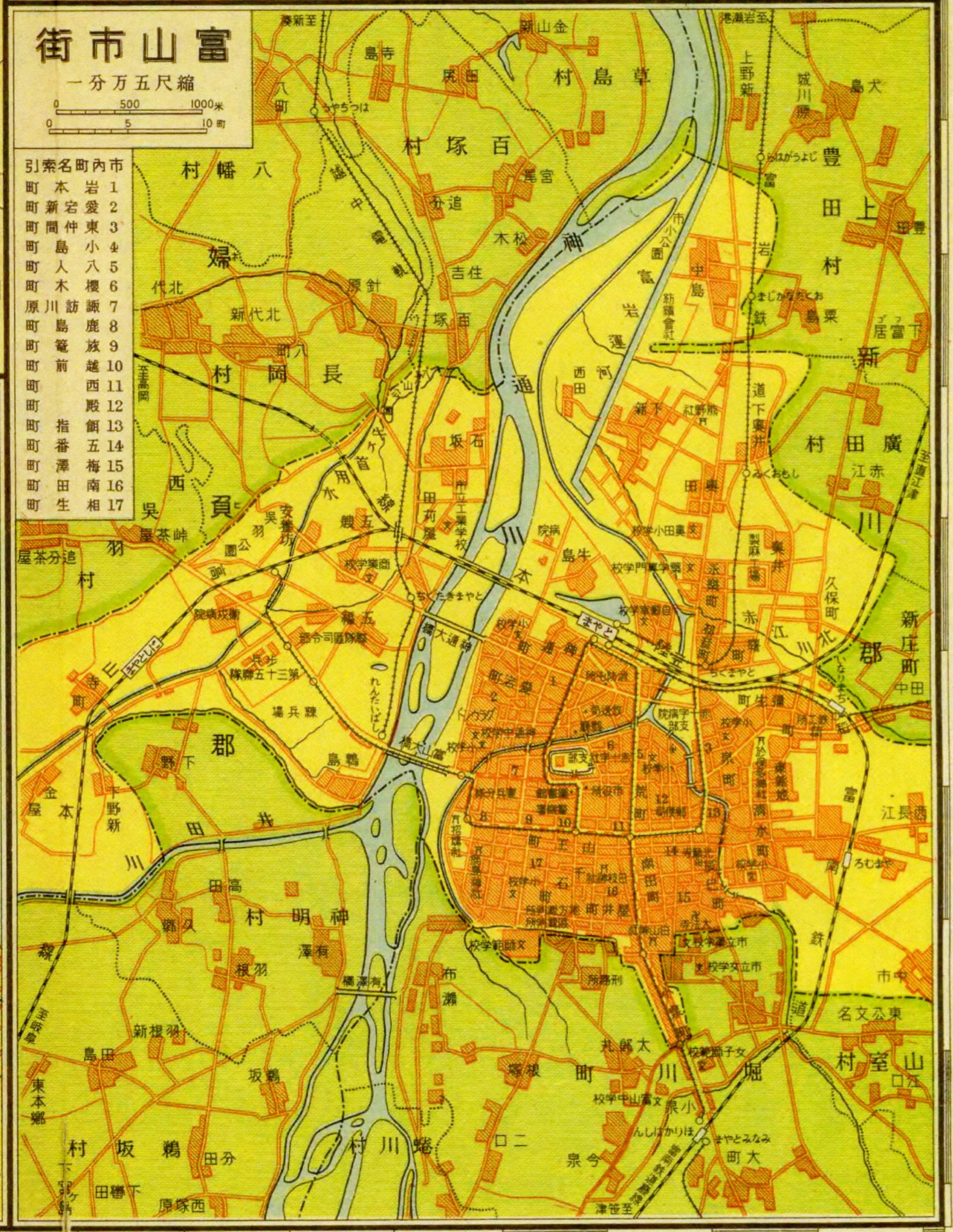 1937年（昭和12年）当時の富山市街地図